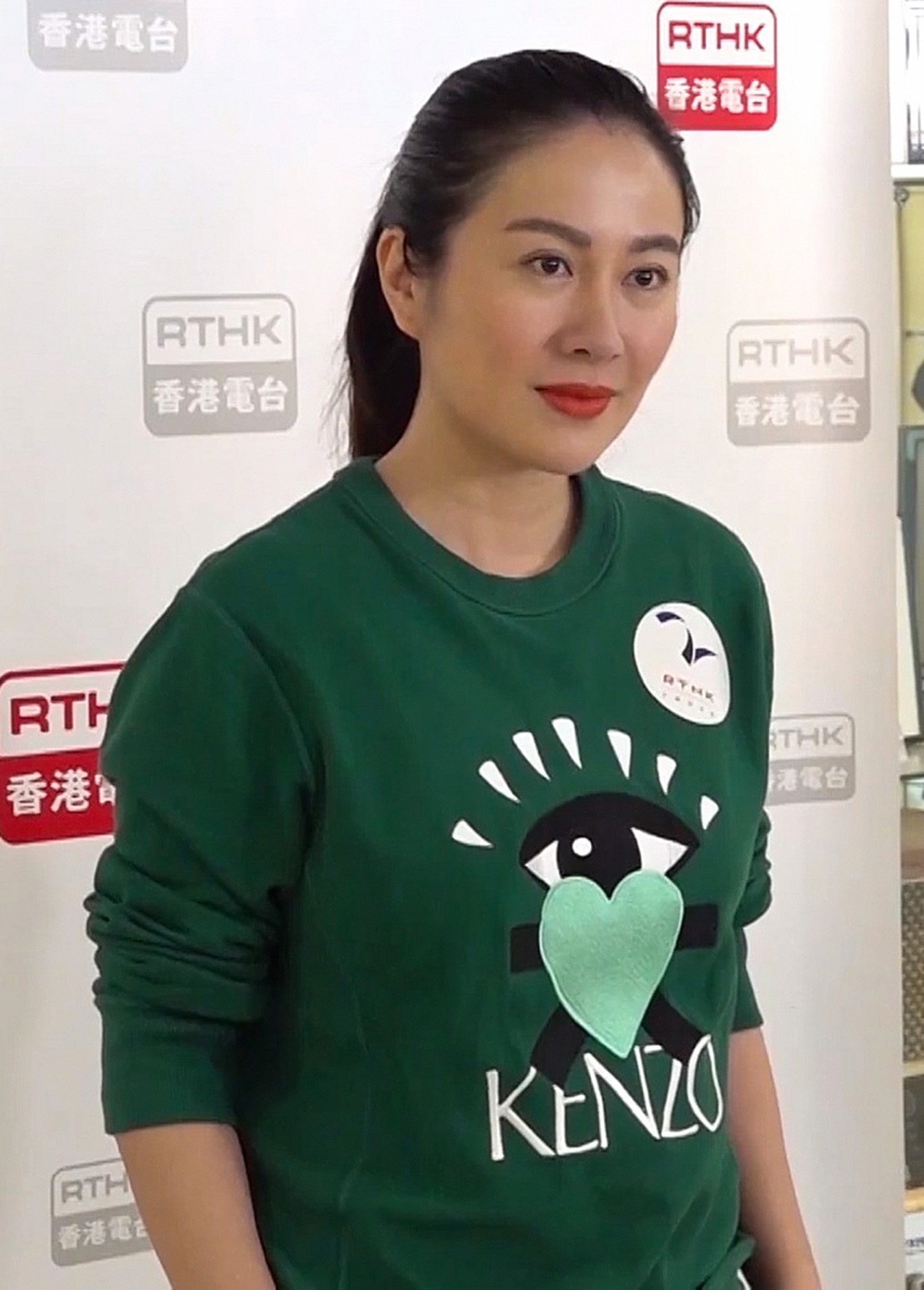 中文（香港）: 出生於中國浙江杭州，從小就在優渥的家境成長。10歲時跟隨在美國經營房地產生意父親移民美國紐約，1999年代表美國紐約到香港參選國際中華小姐，取得冠軍及「最具古典美態獎」，2010年憑電影《意外》首奪《第29屆香港電影金像奬》及《第二屆優質華語電影大獎》的「最佳女配角」殊榮。